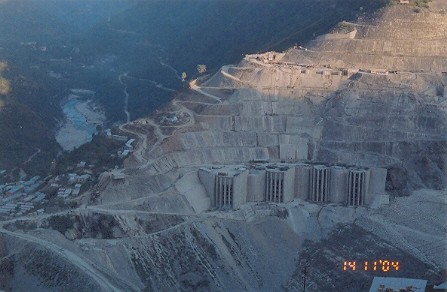 Tehri dam